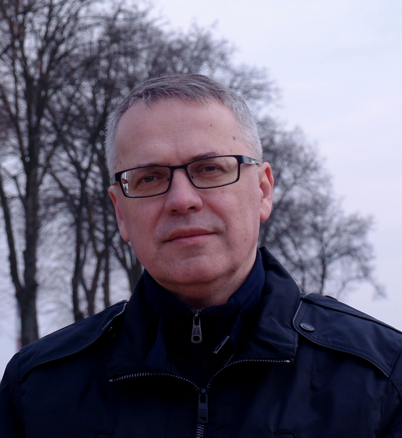 Andrzej Piotr Kowalski.